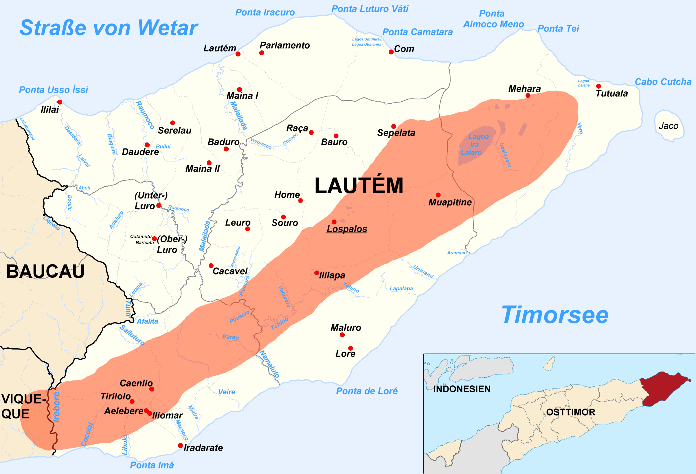 Verbreitungskarte der McCords Schlangenhalsschildkröte im Distrikt Lautém, Timor.